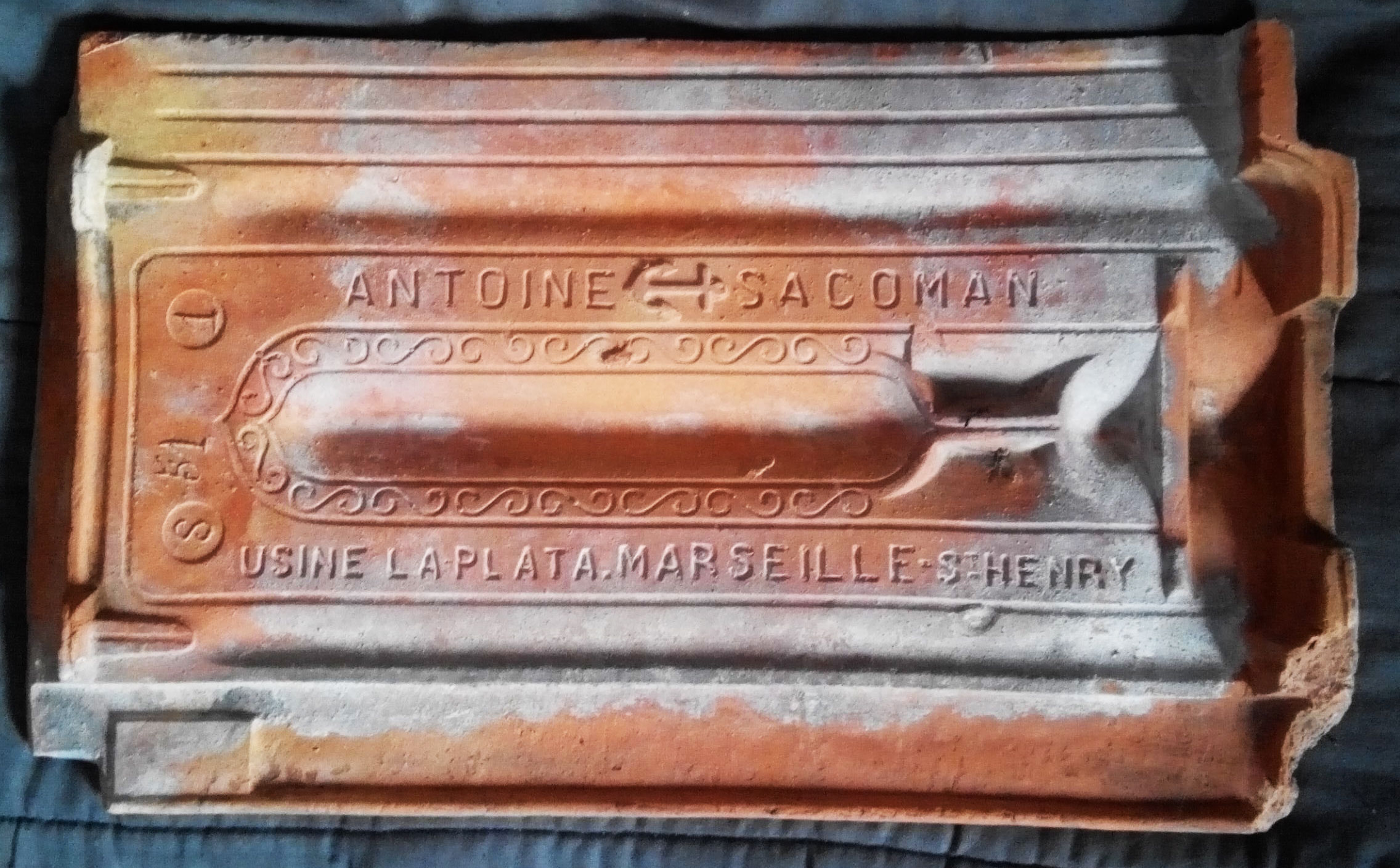 Черепиця, якою були вкриті господарські будівлі панського маєтку